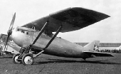 Dewoitine D-1 C-1